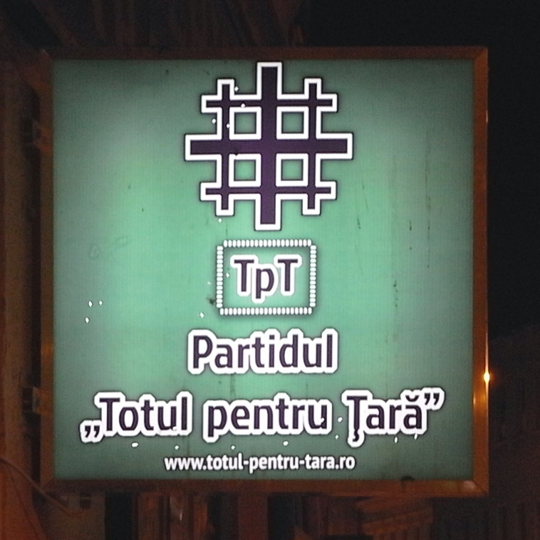 Schild der Partei "Totul pentru Țară" in Kronstadt (RO).